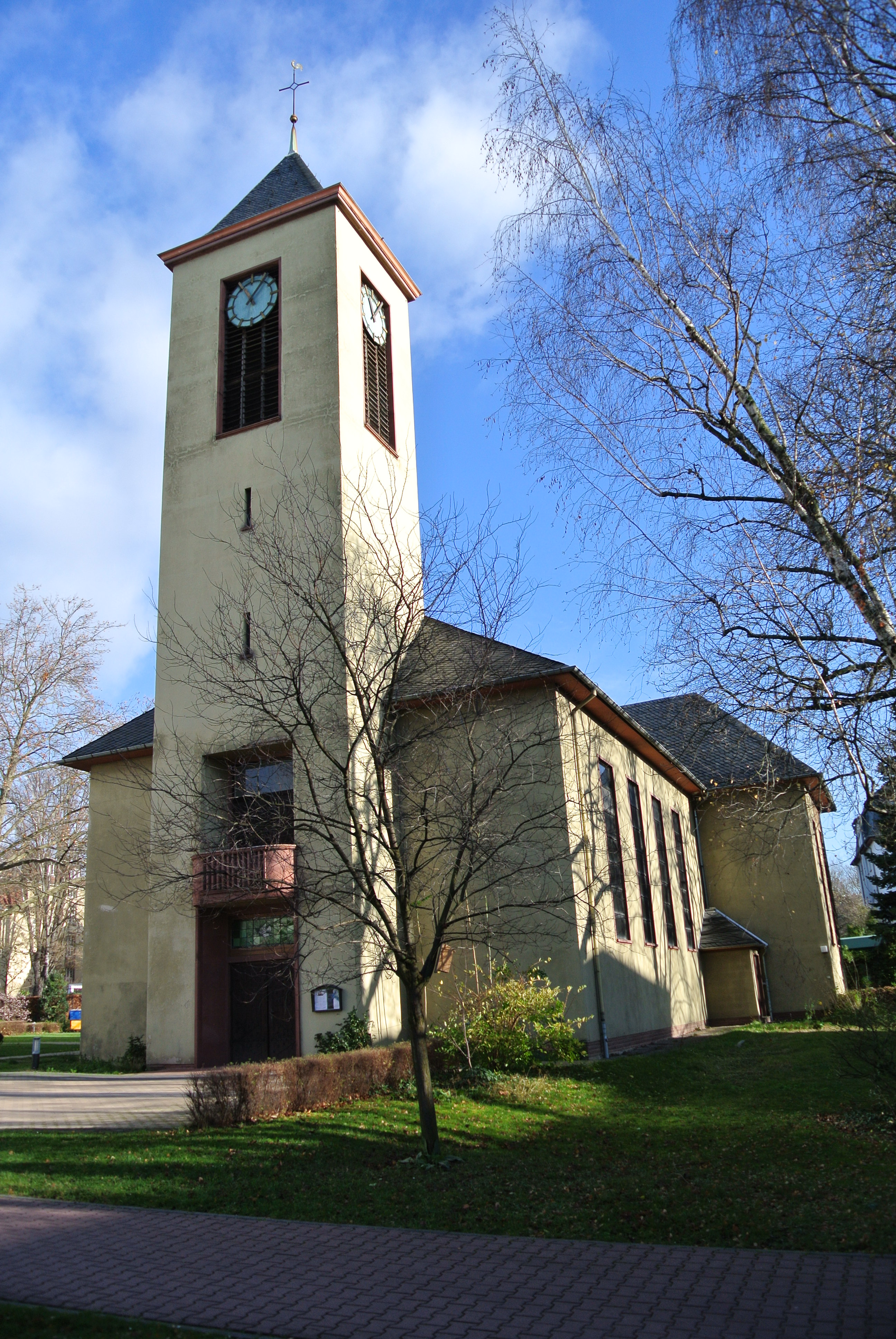 Diakonissenkirche in Frankfurt-Nordend, Holzhausenstraße, Westansicht